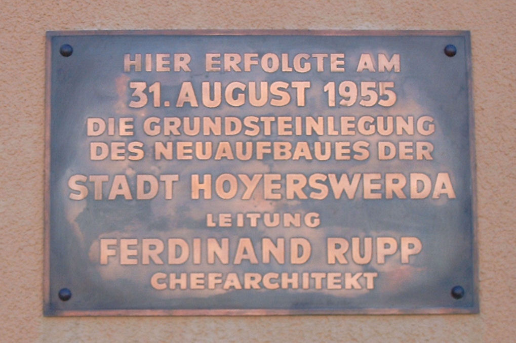 Gedenkplatte zum Wiederaufbau Hoyerswerdas an einem Wohnhaus in der August-Bebel-Straße